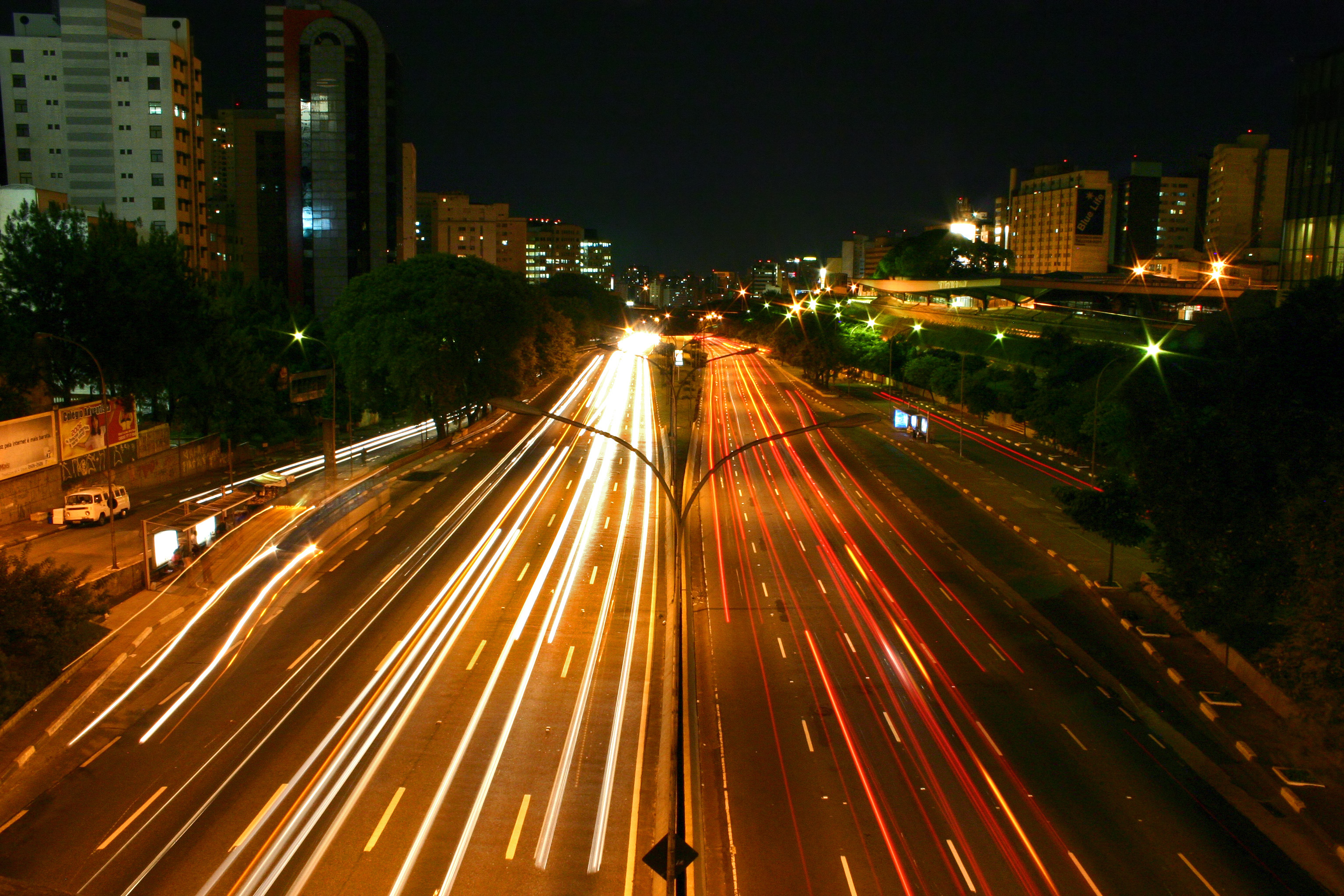 avenida 23 de Maio.